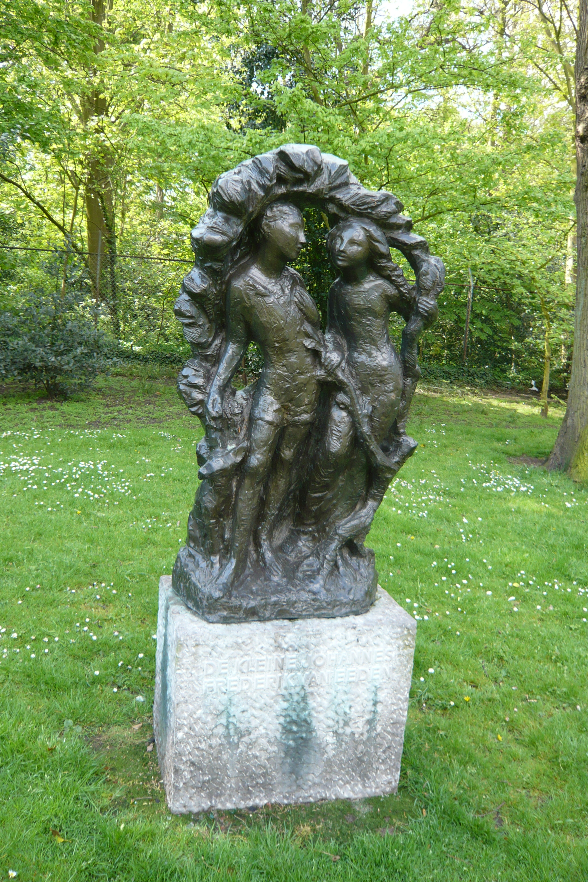 Standbeeld "De Kleine Johannes", gemaakt door Mari Andriessen, in het Frederickspark, Haarlem.